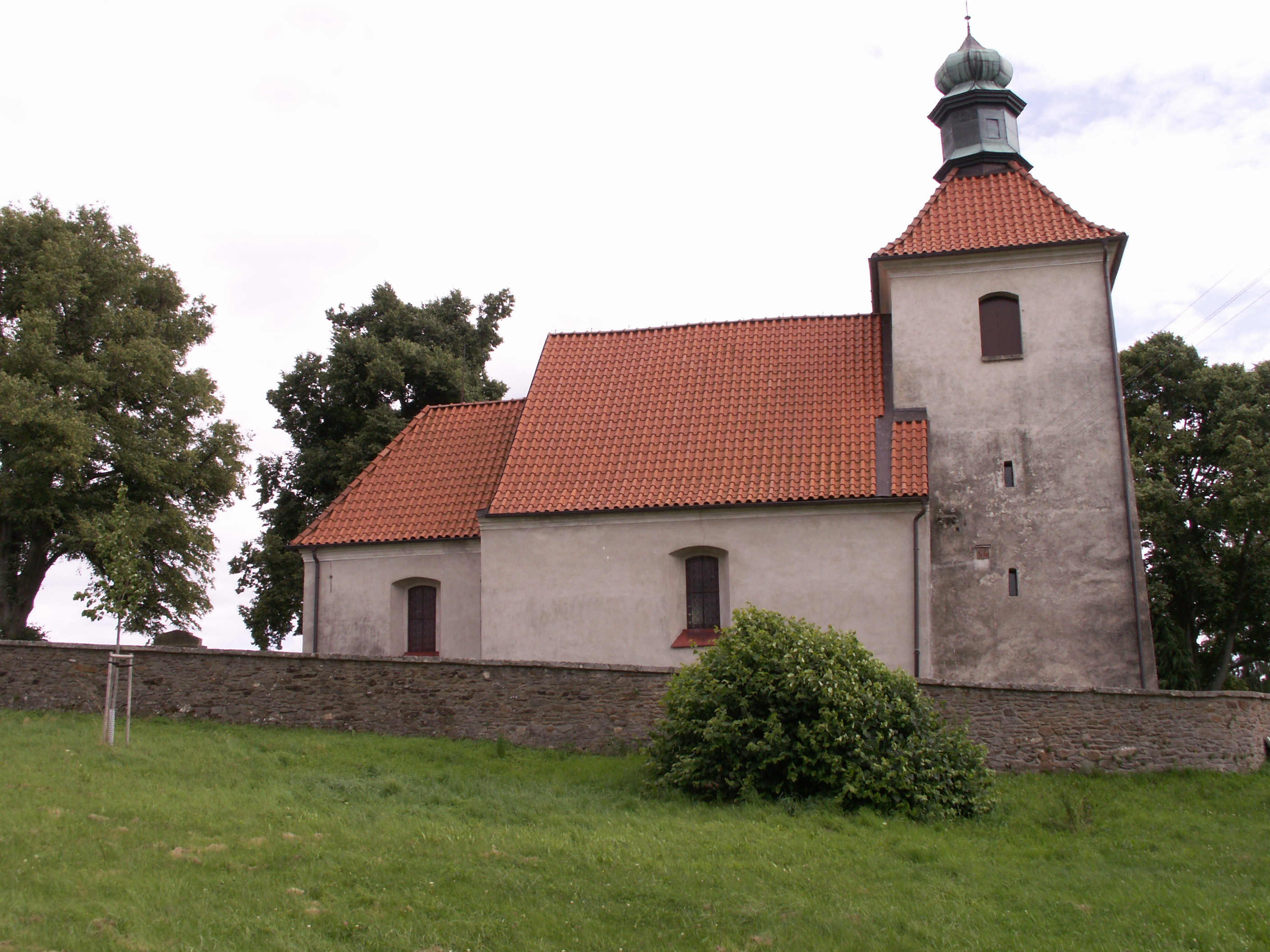 Sačany, osada místní části Vrbka města Ledeč nad Sázavou, kostel sv. Jana Křtitele, původně gotická stavba, přestavěno ve 20. století, věz připojena 1753